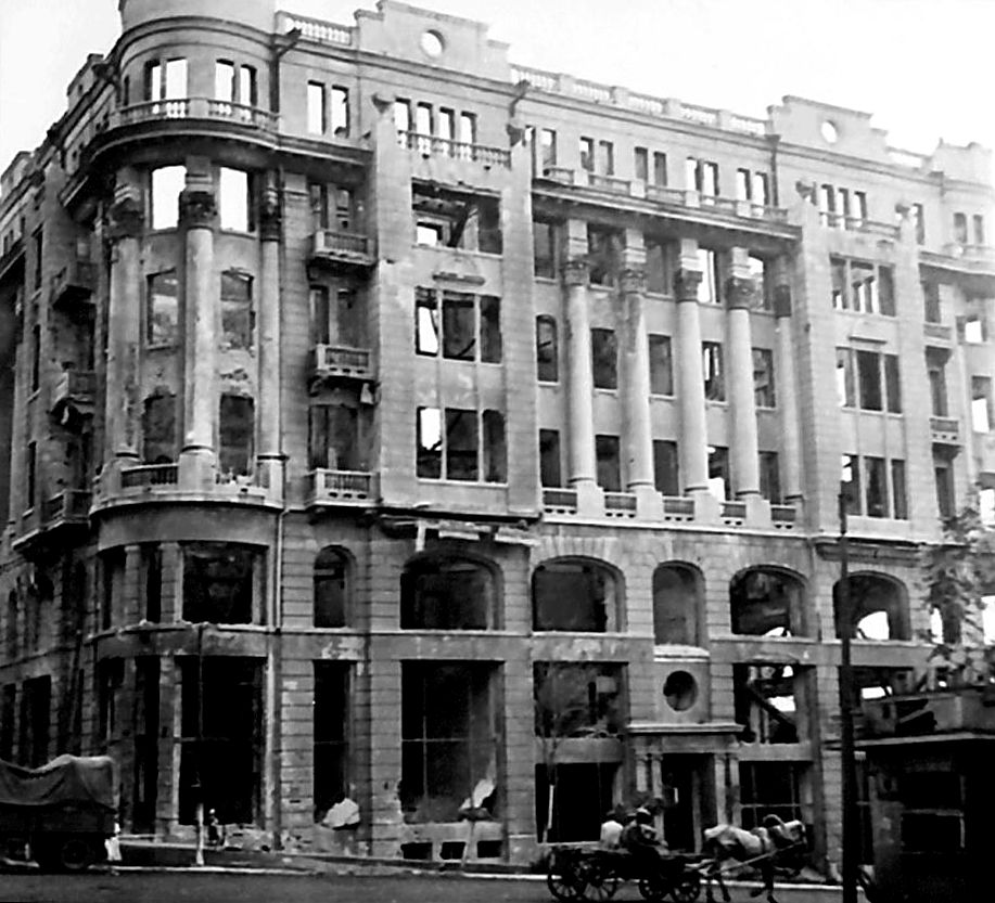 Ростов-на-Дону. Доходный дом Рецкер и Хосудовского, 1942г. .